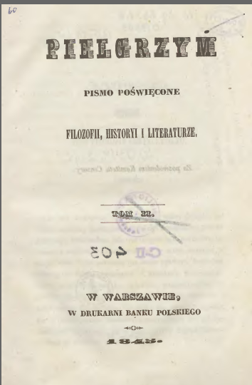 Strona tytułowa czasopisma "Pielgrzym. Pismo poświęcone filozofii, historii i literaturze", Warszawa 1843